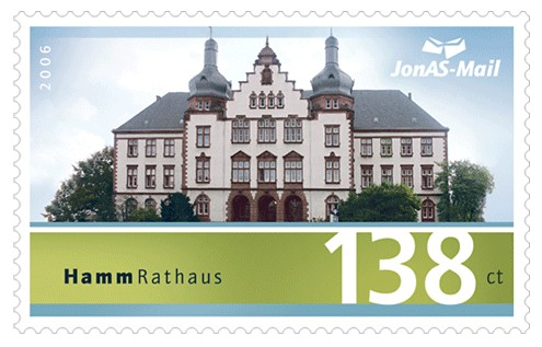 Das Bild zeigt das Rathaus Hamm auf einer Briefmarke der Firma JonAS-Mail.